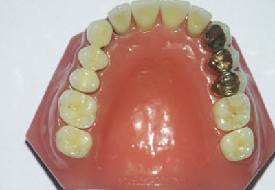 Brug op model. eigen foto